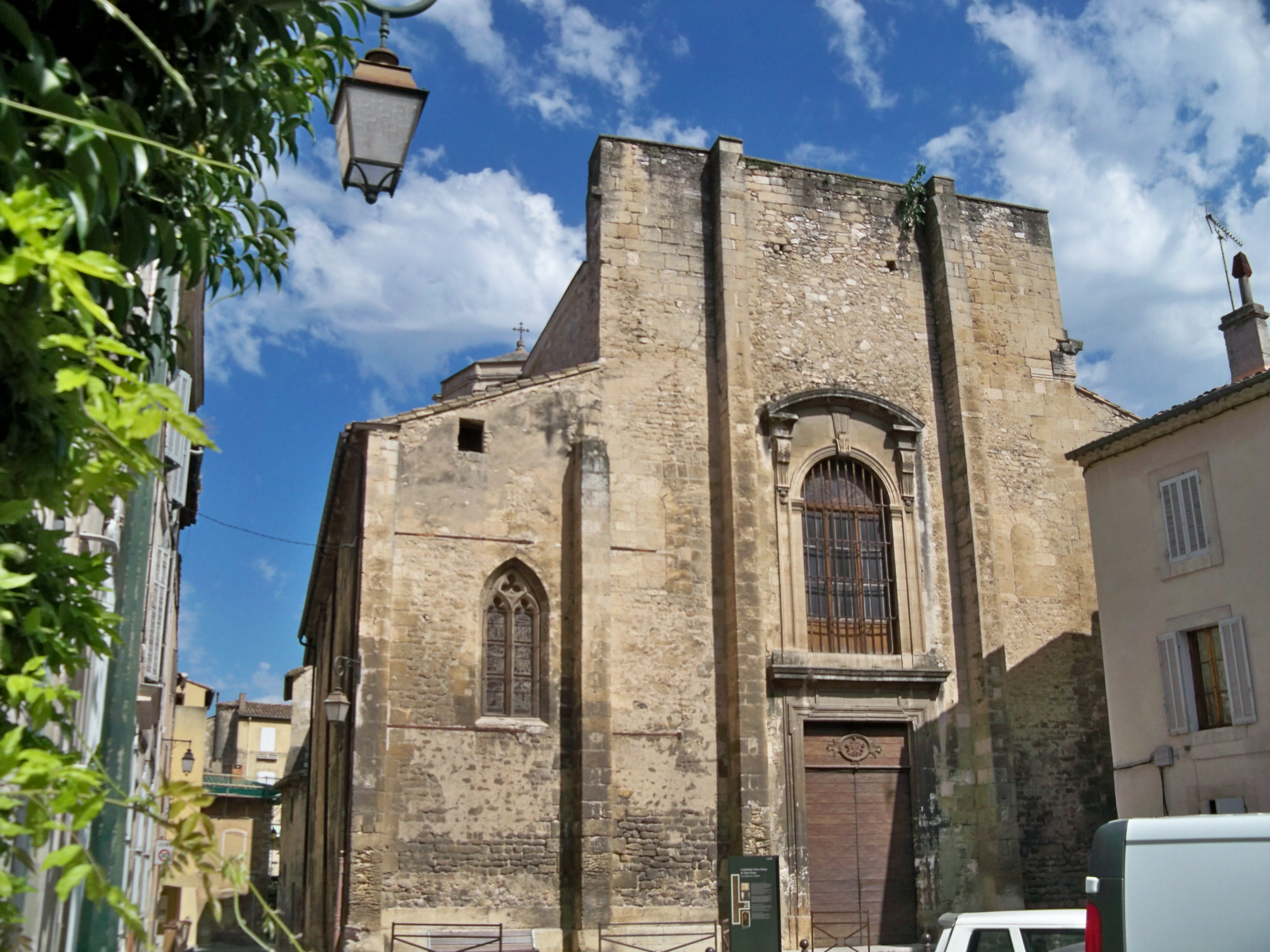 Cathédrale Notre-Dame-et-Saint-Véran de Cavailloncloître (ClasséClassé) .